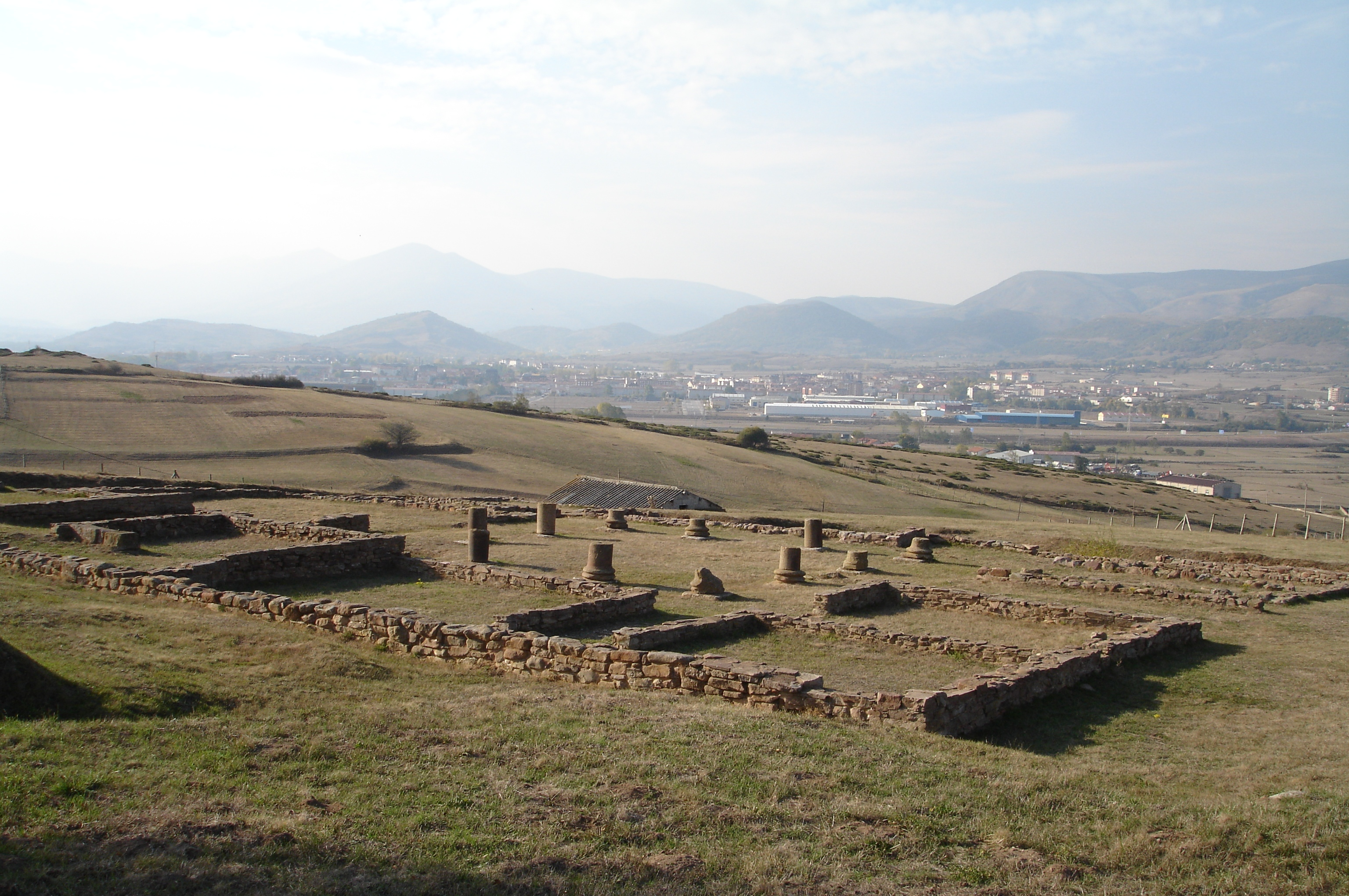 Detalle de los restos arqueológicos de la denominada Casa de los Morillos situada en la ciudad romana de Julióbriga. Obsérvese los fragmentos de basas y columnas que franqueaban el atrio (atrium) de la casa en cuyo interior se encontraba un estanque de agua o impluvium donde se recogía el agua de lluvia. Al fondo, podemos apreciar el perfil de Reinosa.